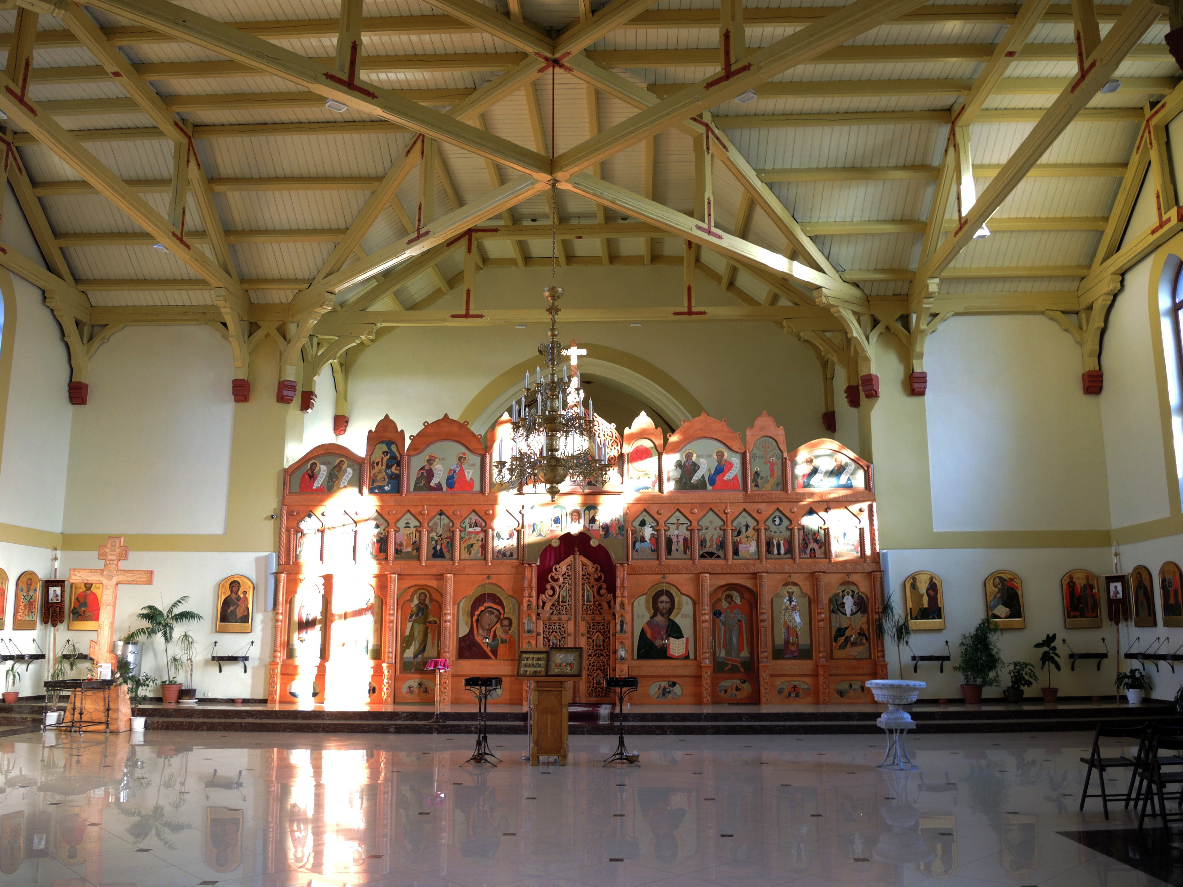 Кирха: улица Московская, 40а, Зеленоградск, Зеленоградский район, Калининградская область